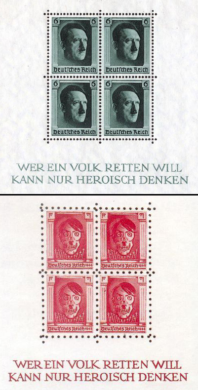 Почтовый блок Германии к 48-летию Гитлера, 1937 год (Скотт #B102), и его пародия, 1944 год. (фрагменты)